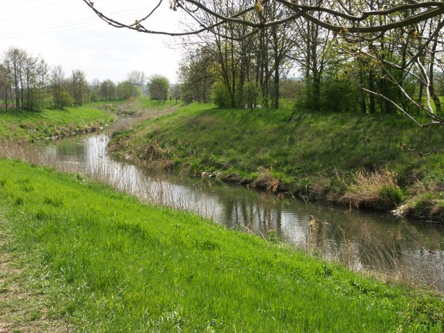 Nidda bei Klein-Karben / River Nidda near town of Klein-Karben